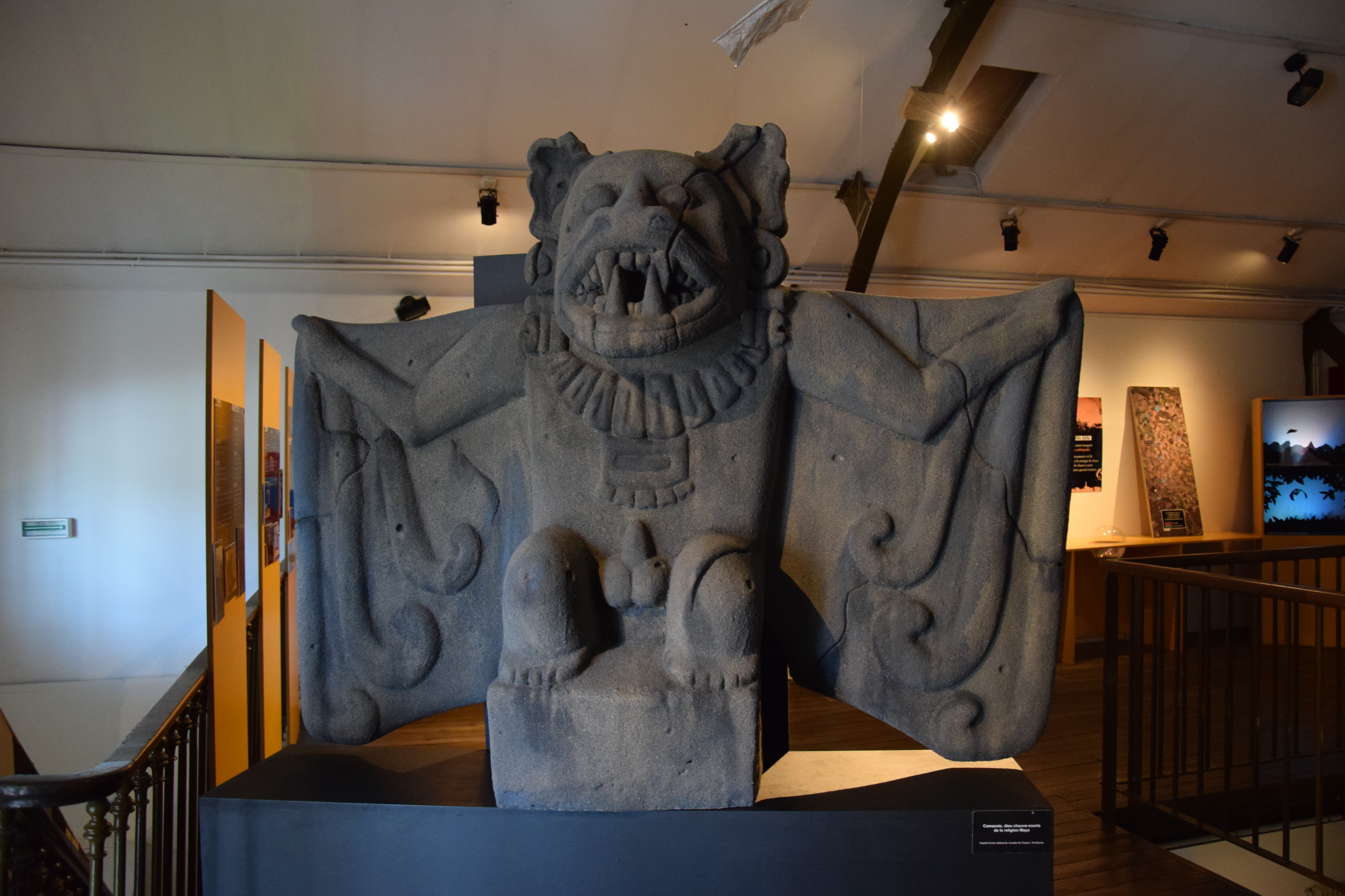 Muséum d'histoire naturelle de Bourges